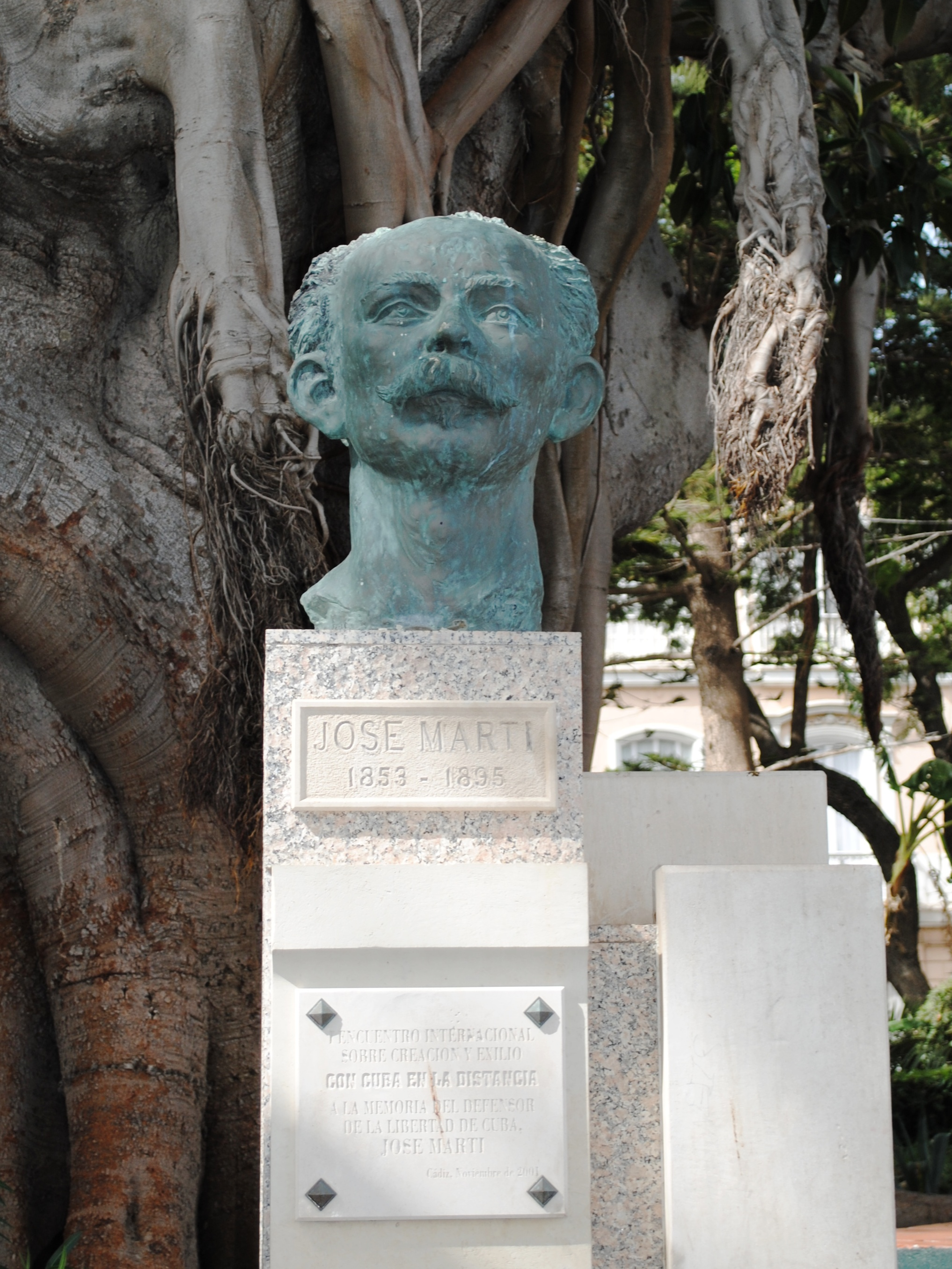 A José Martí en la alameda Marqués de Comillas de Cádiz.